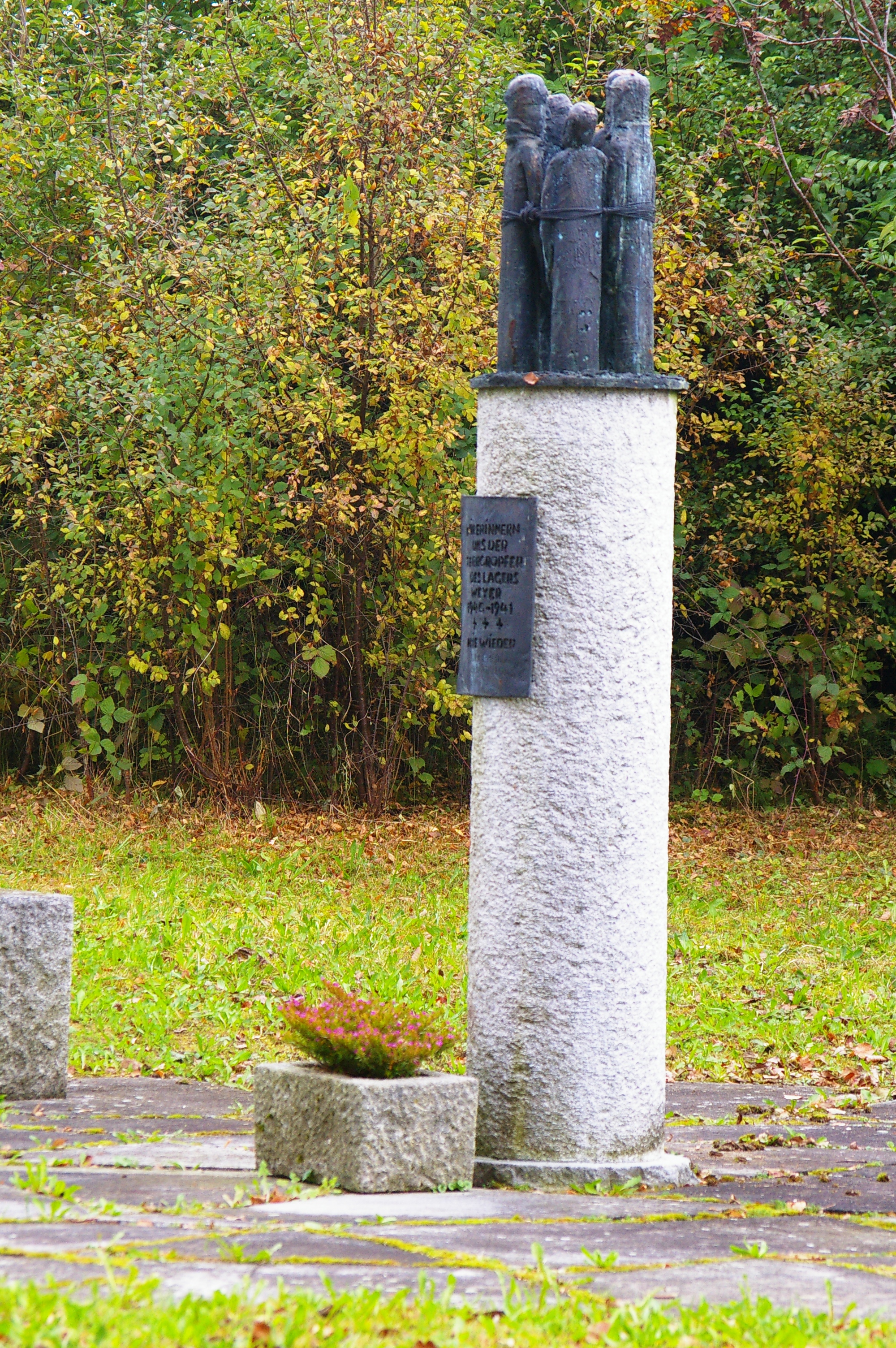 Gedenkstätte Arbeitserziehungslager Weyer Gemeinde St.Pantaleon Oberösterreich